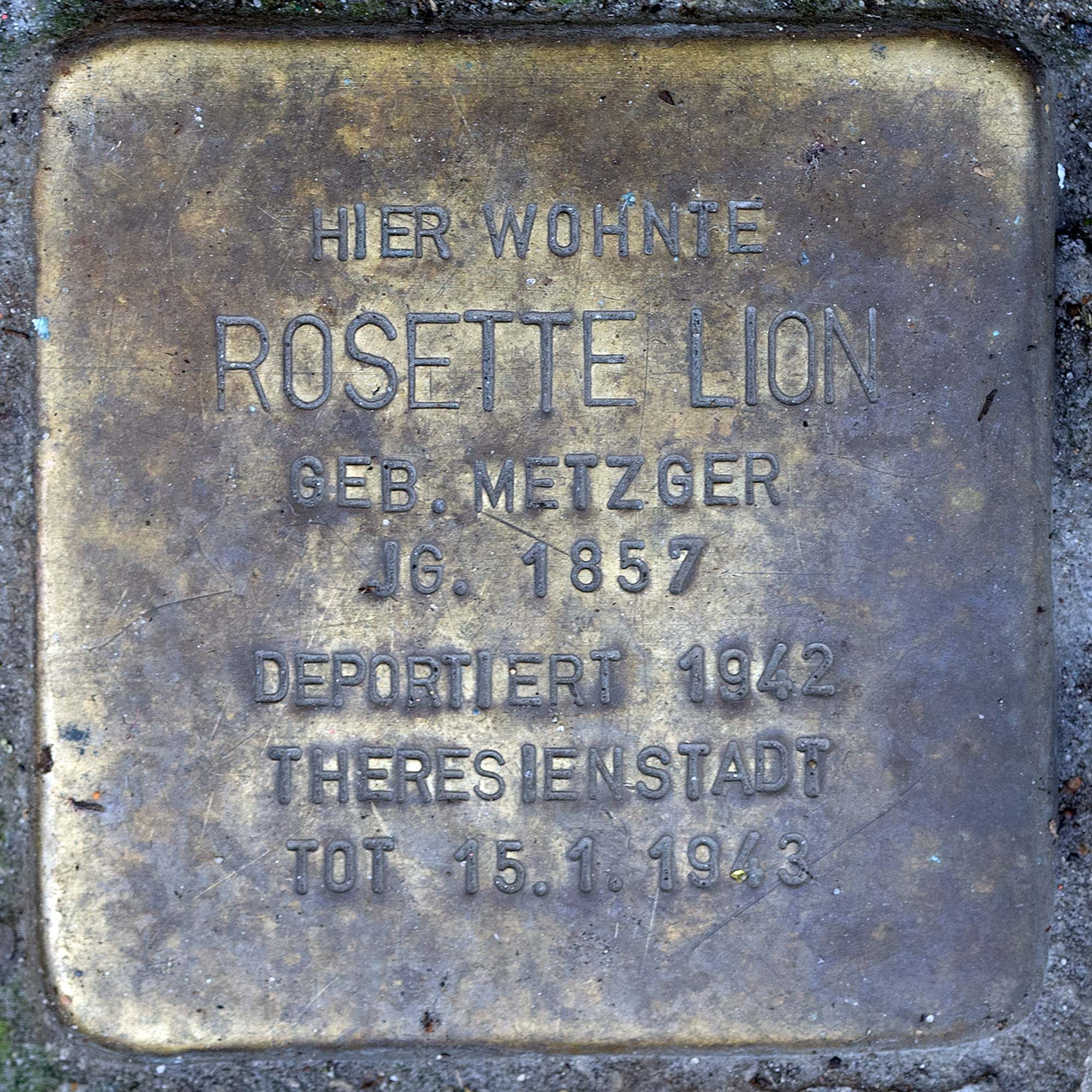 Stolperstein für Lion Rosette